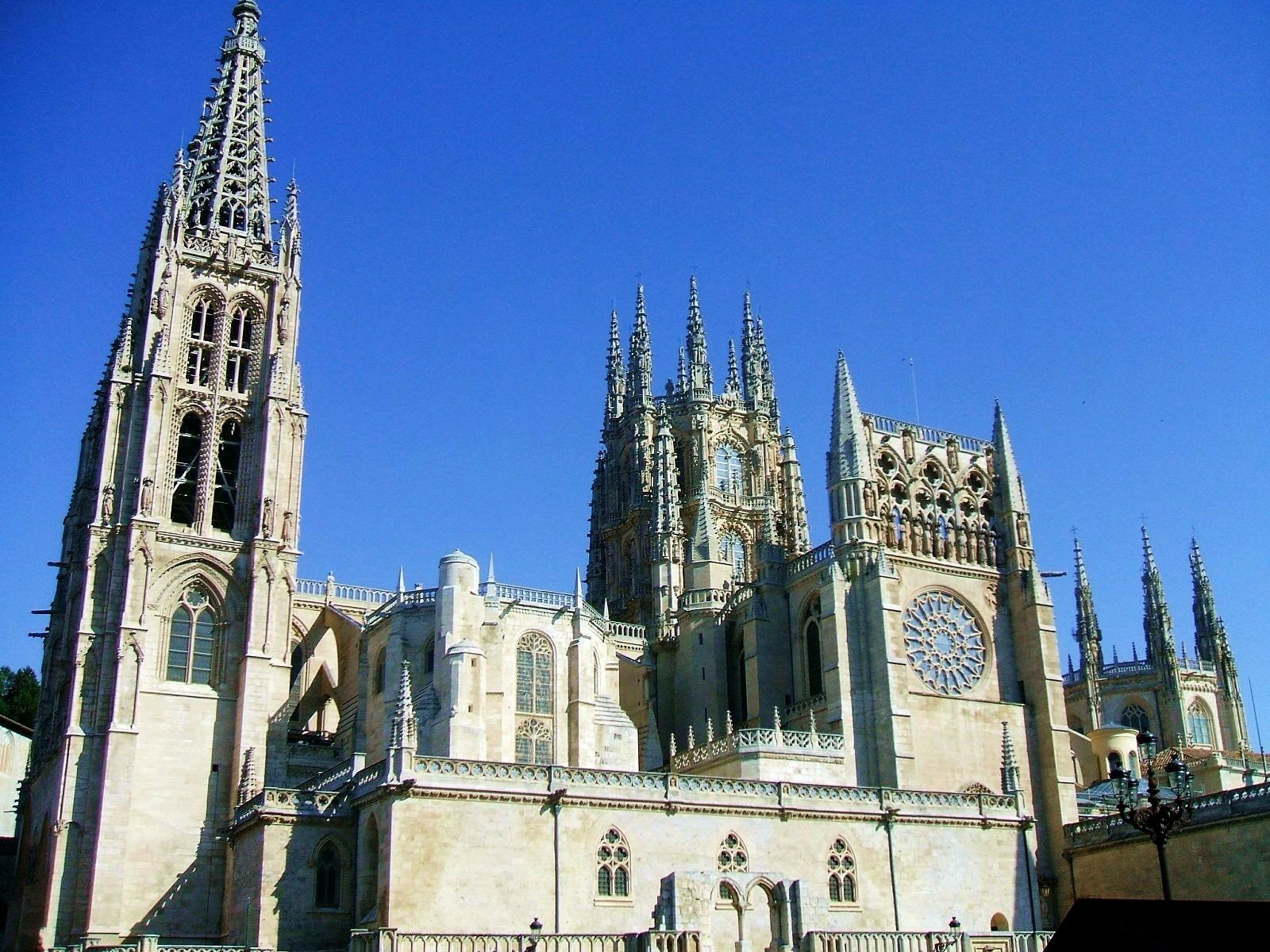 Catedral de Burgos (España), desde la Plaza de San Fernando.